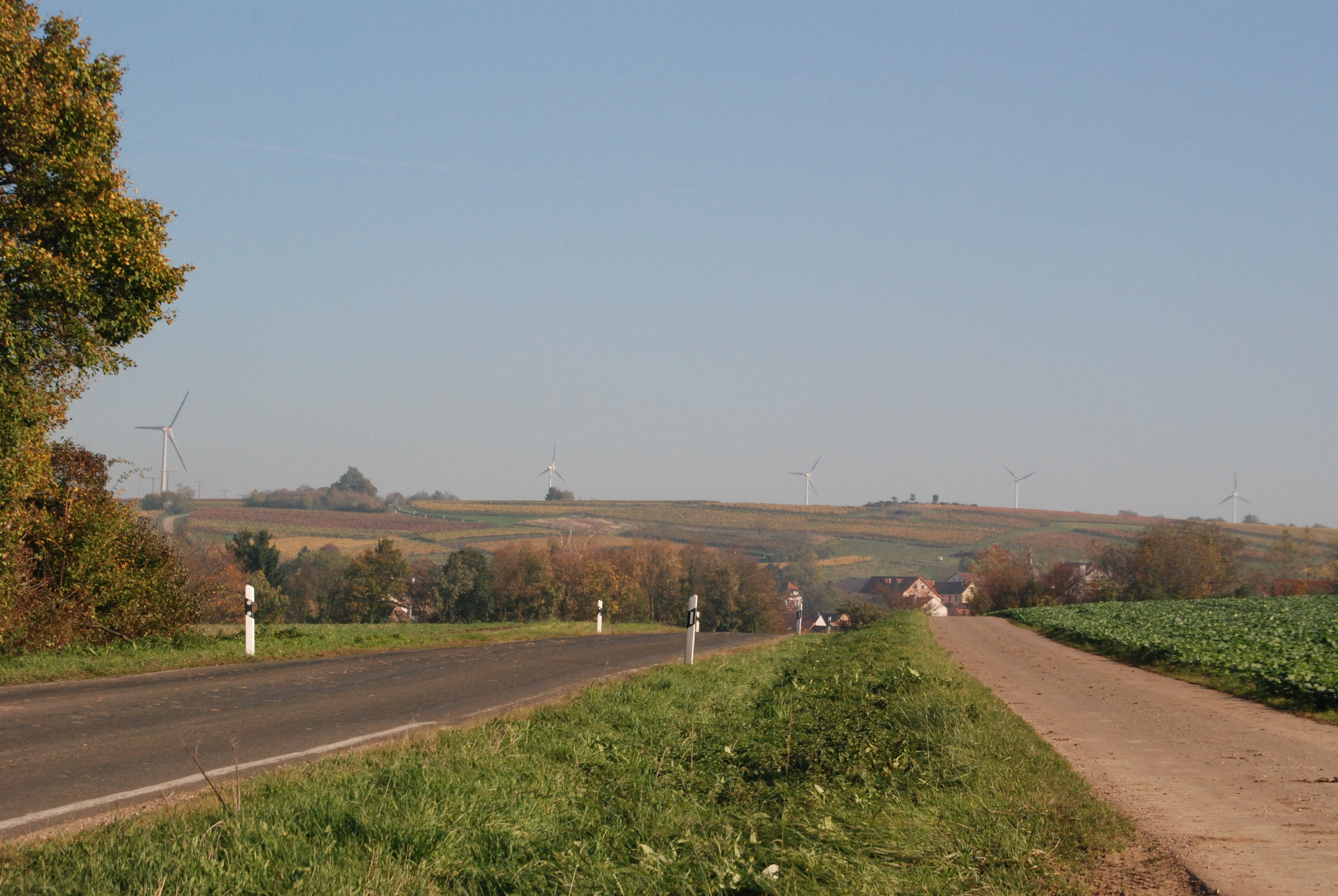 Rommersheim, Gemeinde Wörrstadt; Blick auf Rommersheim